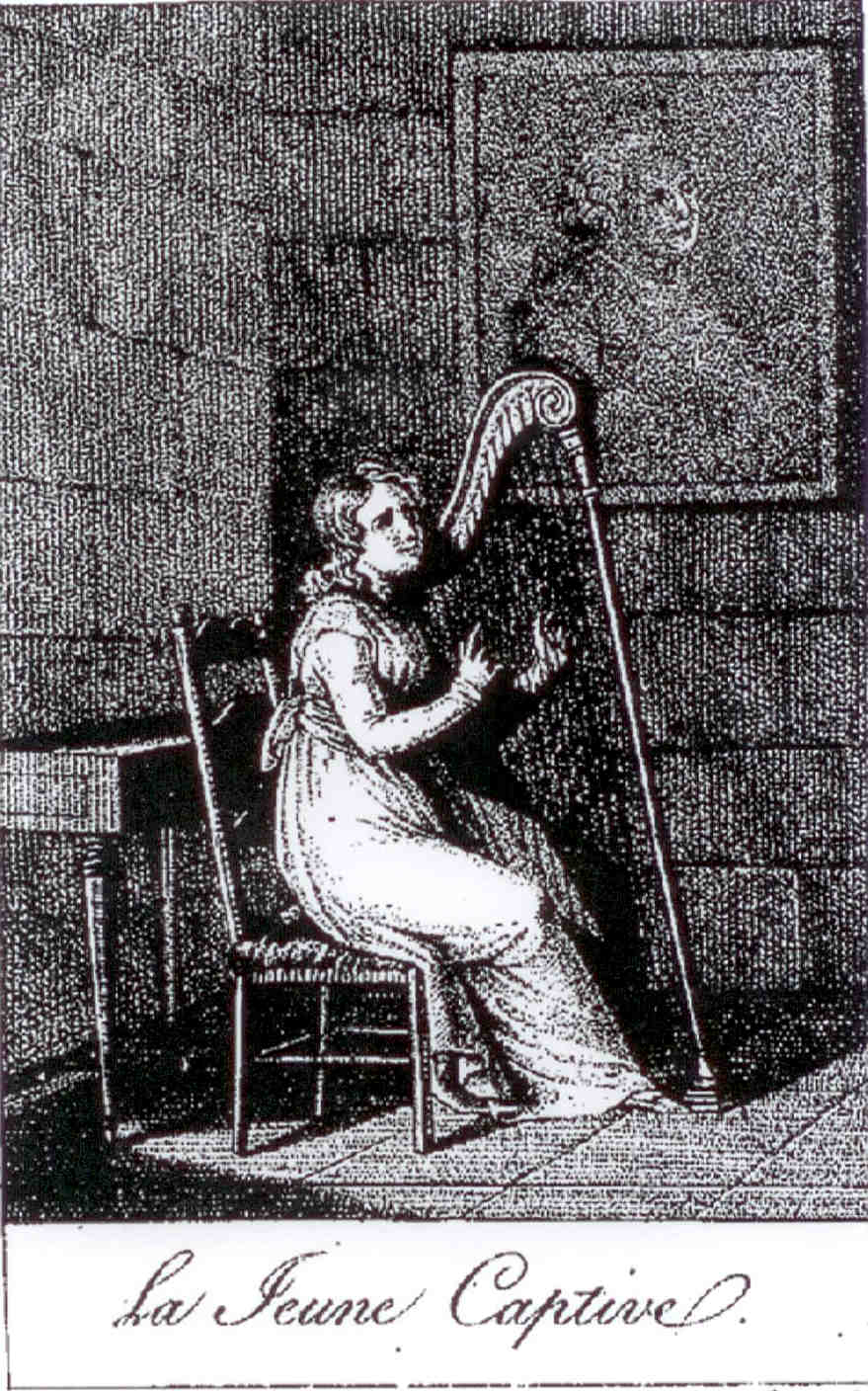 Gravure ornant un livre ancien